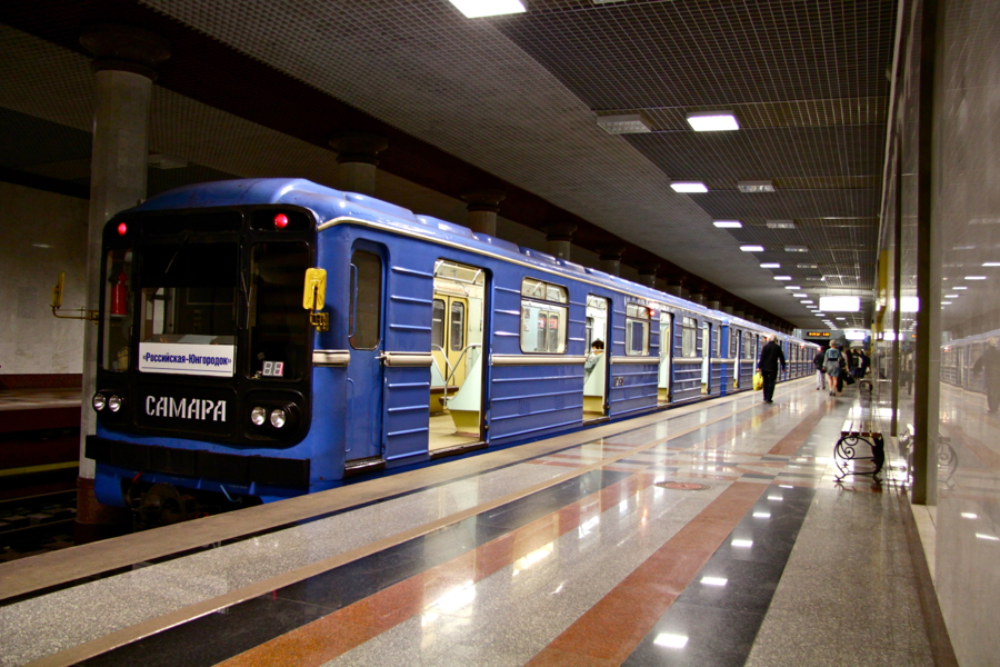 Samara Metro (Самарский метрополитен)